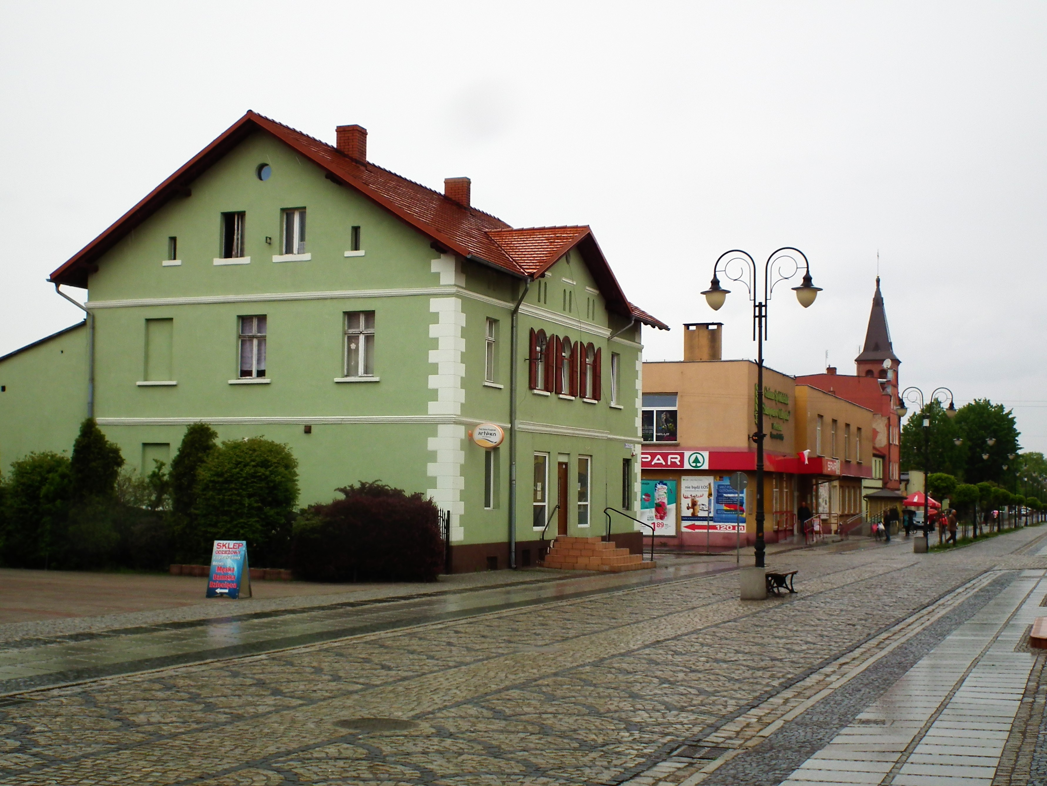 Widok z ul. Hutniczej w Pieńsku, czyli głównego deptaku w mieście.